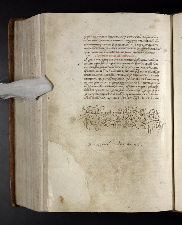 Старонка Дзесятаглава. Прыпіска Мацвея Дзясятага тайнапісам на адвароце апошняга ліста.